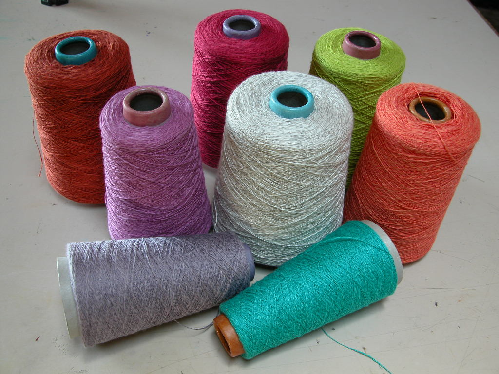 Rochet ou canette ou bobine de fil employé sur métire à tisser industriels